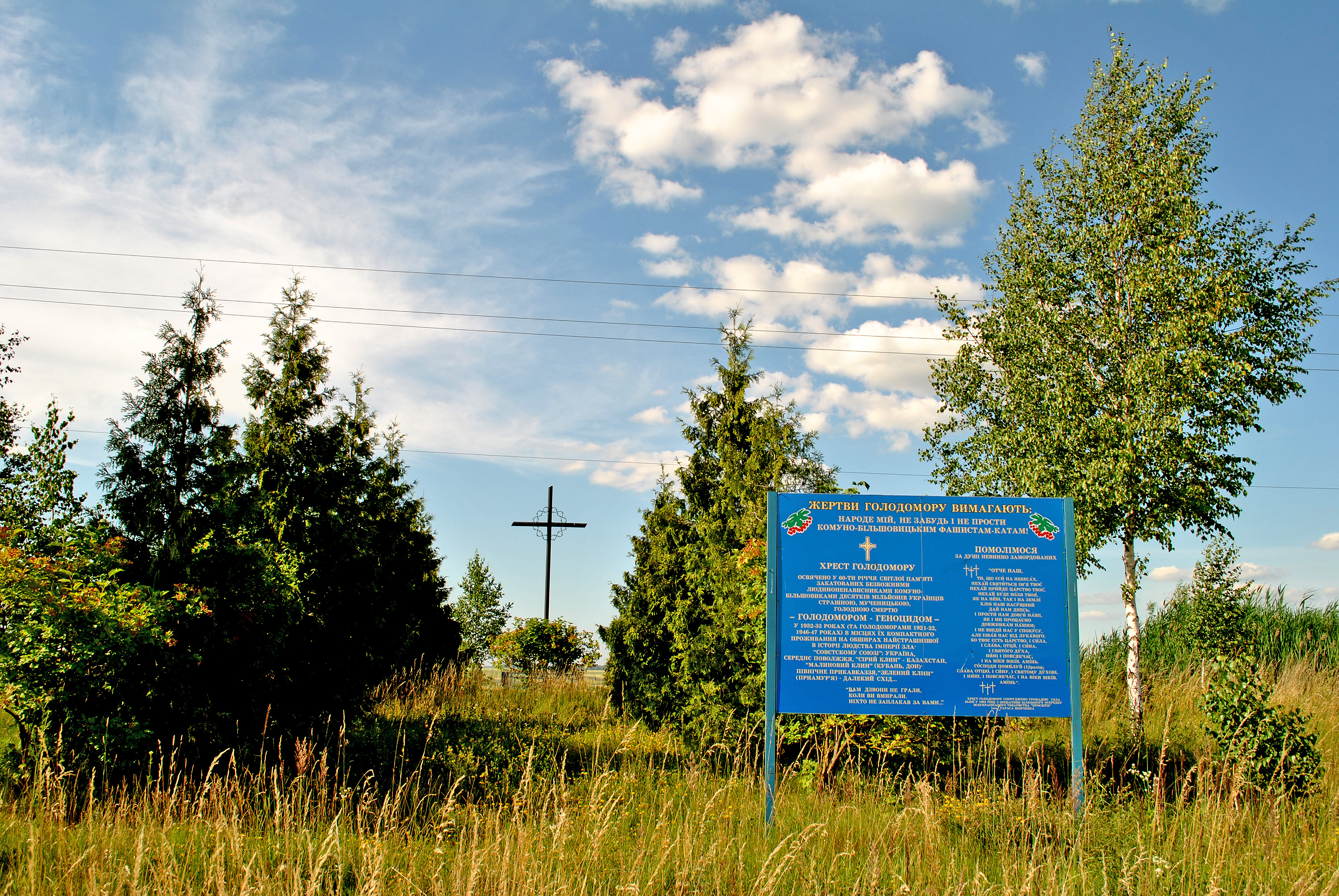 Пам'ятний знак (хрест) жертвам Голодомору 1932—1933 років на північній околиці с. Біла Тернопільськогго району Тернопільської області біля автошляху Автошлях Р 41.